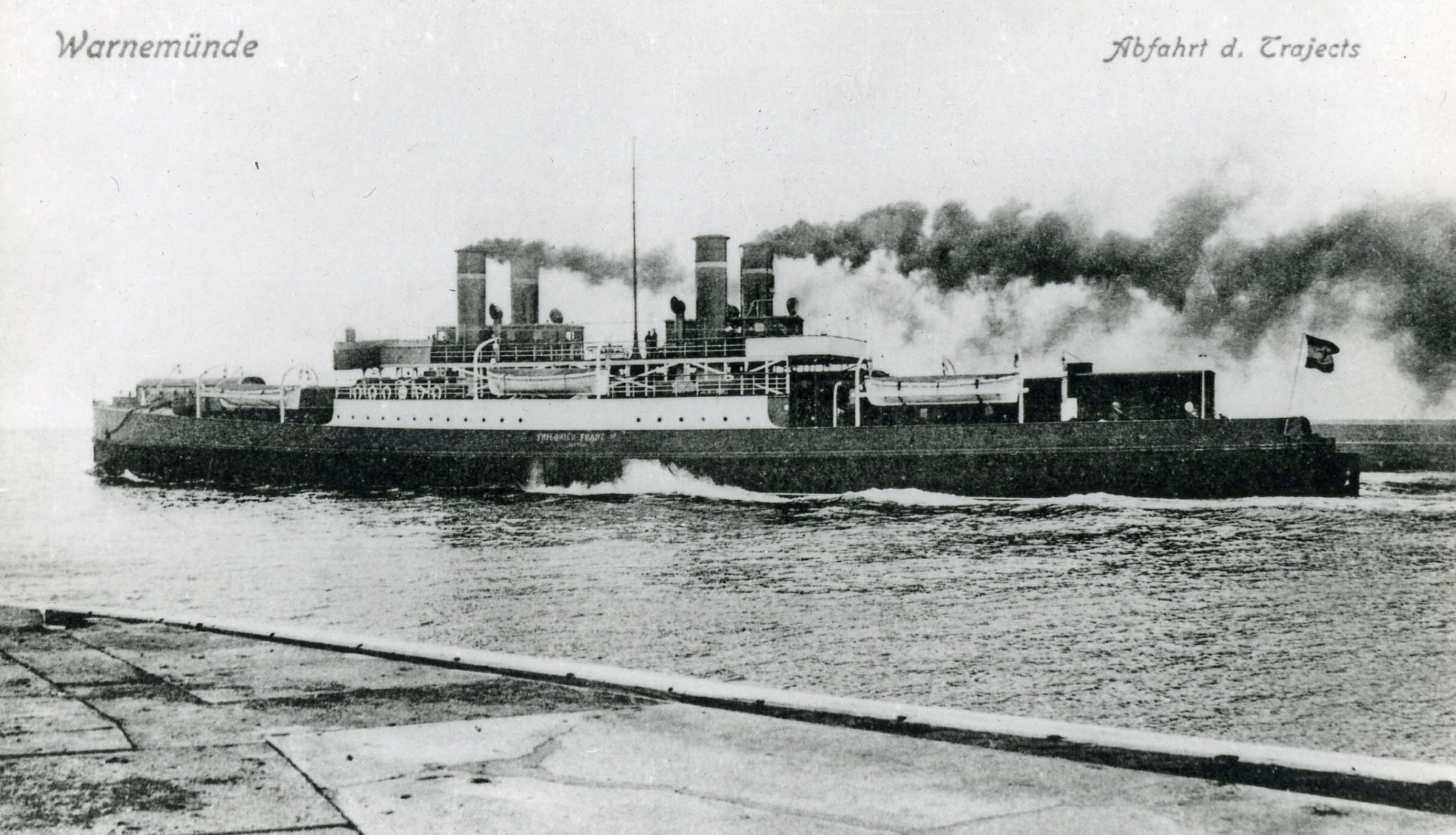 Eisenbahnfährschiff Friedrich Franz IV, Baujahr 1903, Dampf-Schaufelrad-Antrieb, Reederei der Großherzoglich Mecklenburgische Friedrich-Franz-Eisenbahn (M.F.F.E), Fährlinie Gedser-Warnemünde, verschrottet 1926